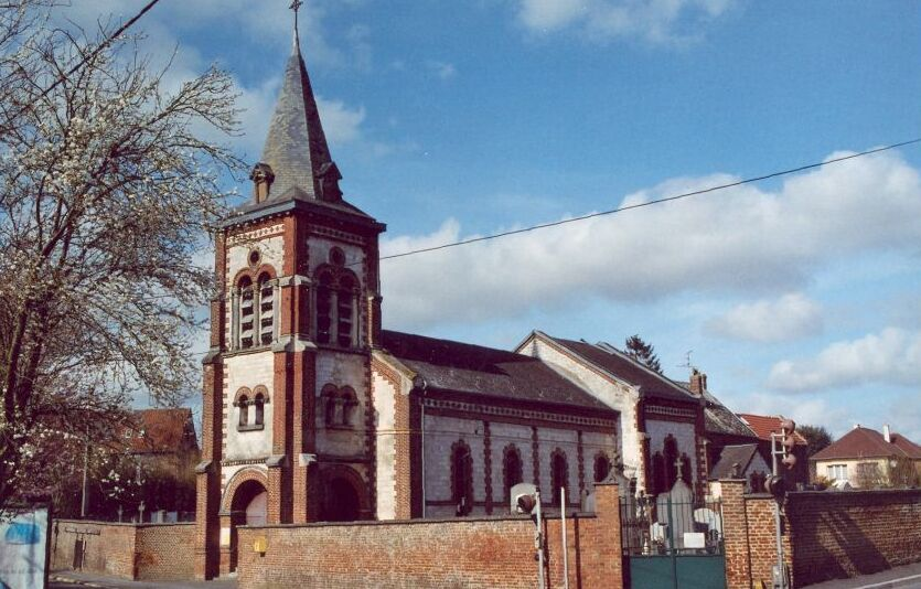 Eglise d'Anzin Saint Aubin